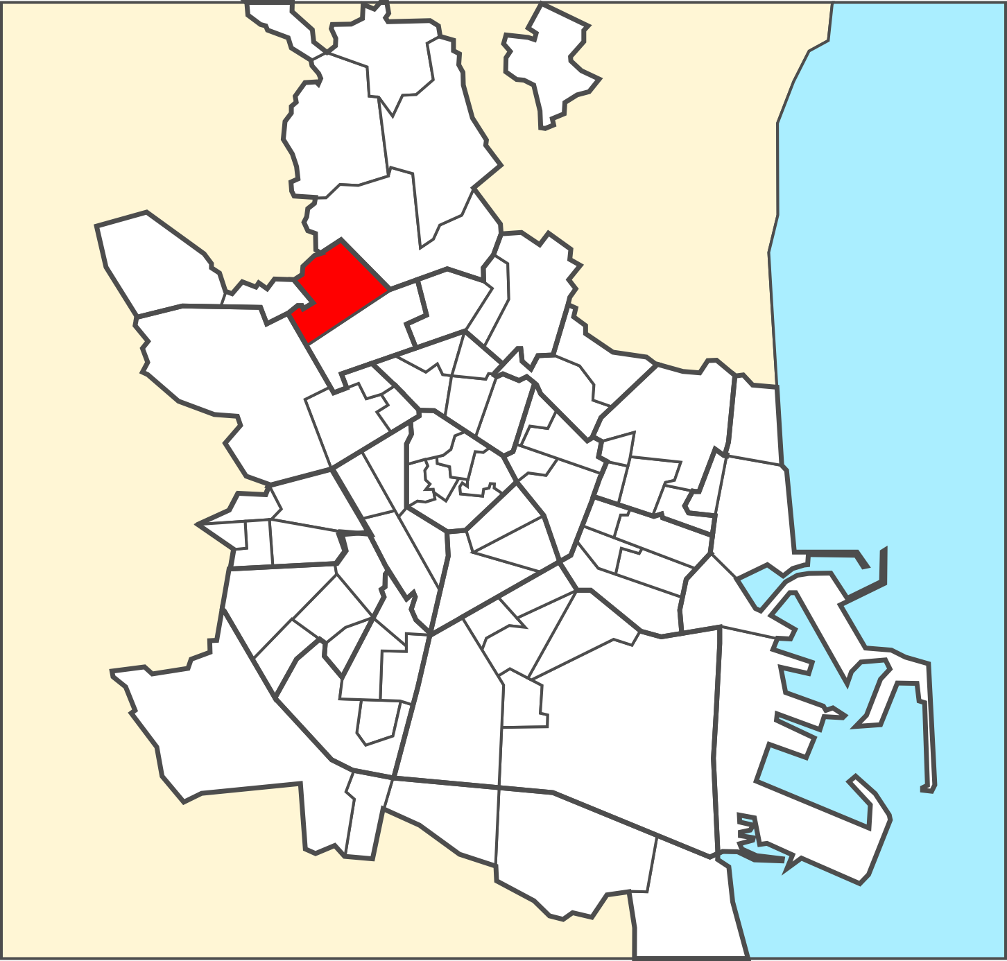 Localització del barri dins de la ciutat de València.